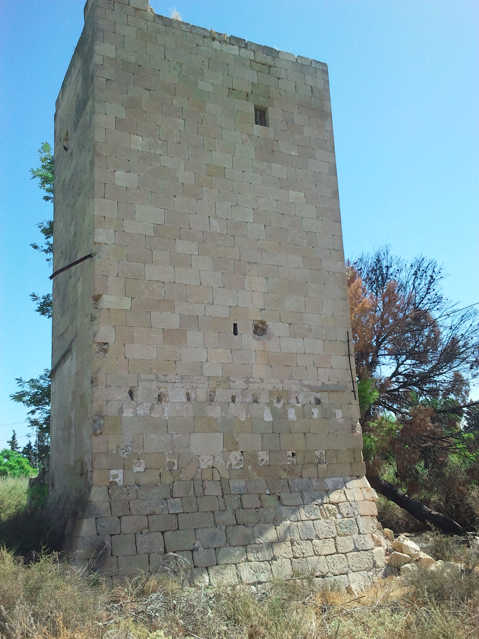 Torre del Xiprer (Alacant)